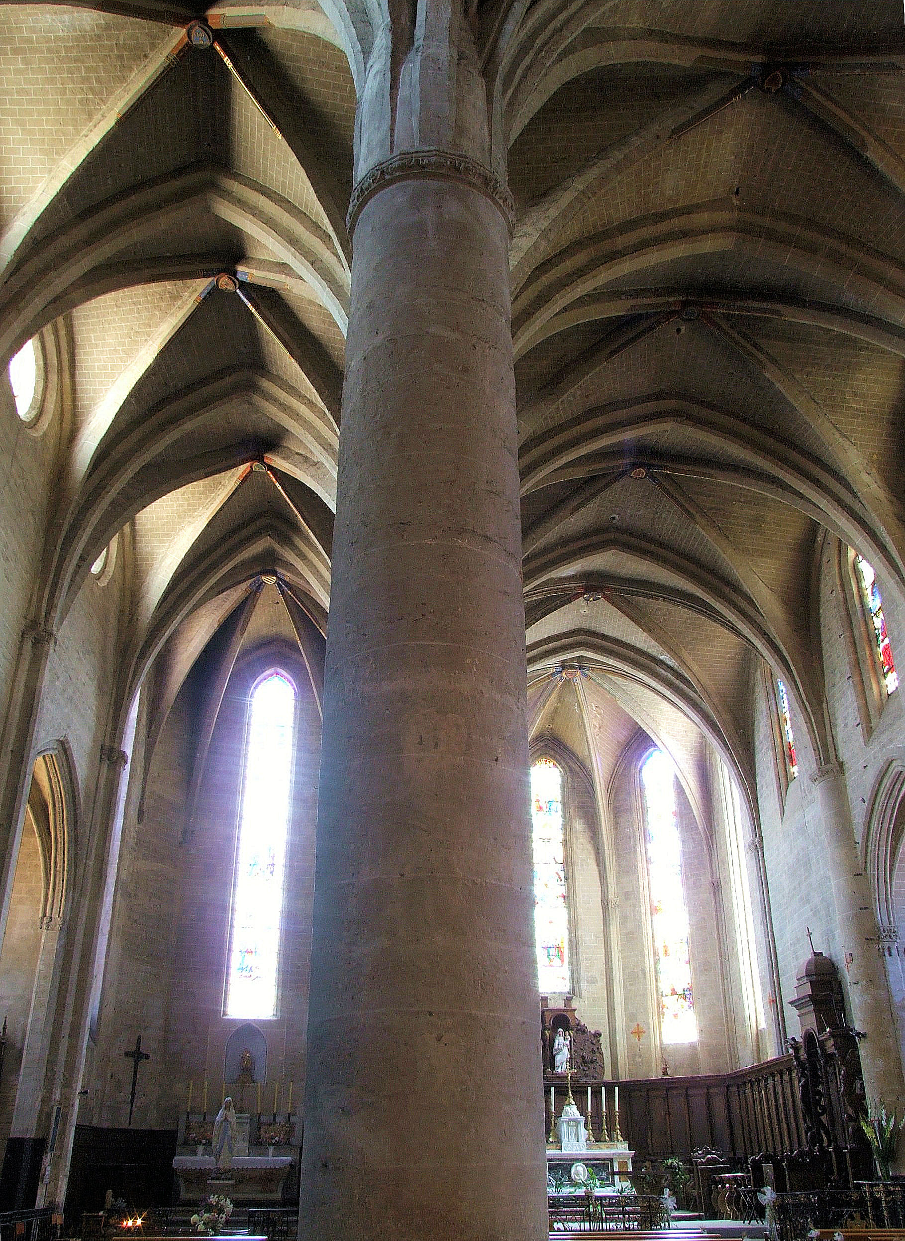 Cathédrale Sainte Marie de Lombez - Les deux nefs